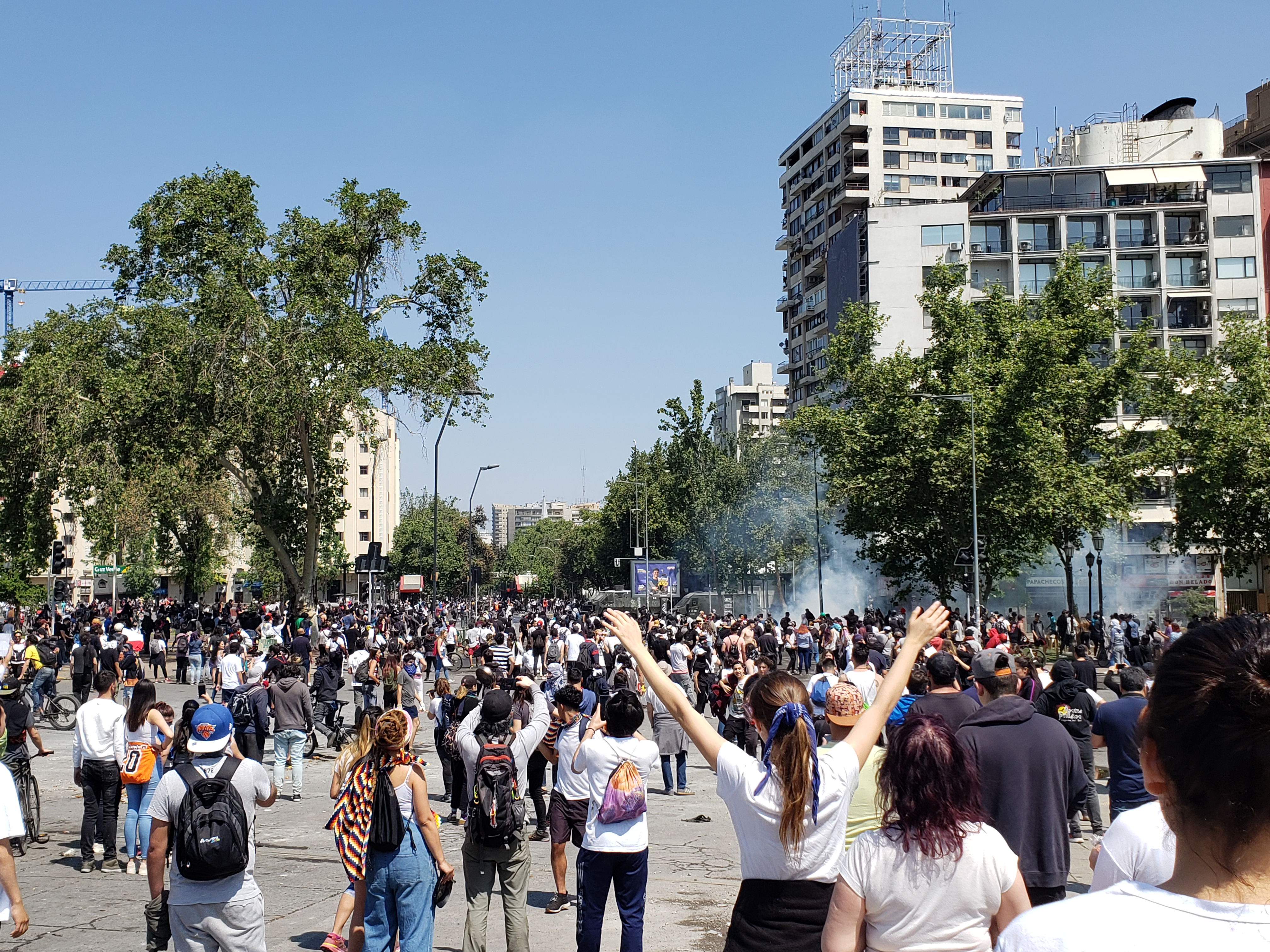 Manifestaciones en Plaza Italia en el marco de las protestas de octubre de 2019 en Santiago de Chile